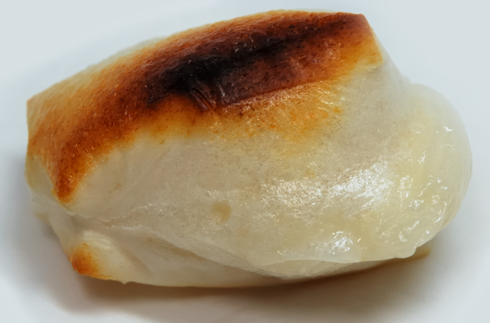 Baked Mochi (焼いたja:餅)